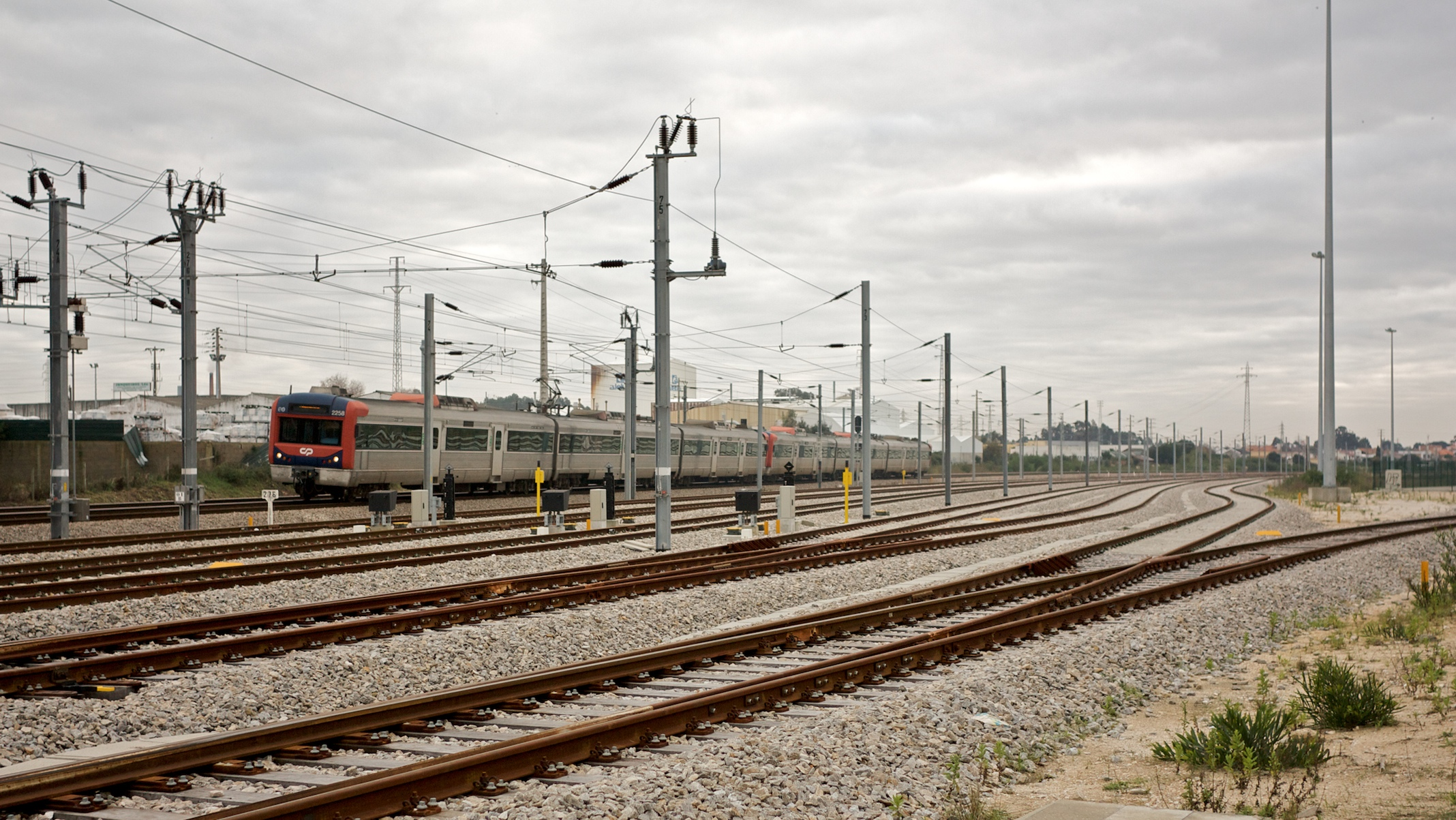 Tipo: Comboio InterRegional 821 [Entroncamento - Porto • Campanhã] Local: Plataforma Multimodal de Cacia [Linha do Norte, PK 275] Data e hora: 4 de Dezembro de 2009 [15h56] Material: Automotoras 2258 e 22xx [Unidades Triplas Eléctricas]